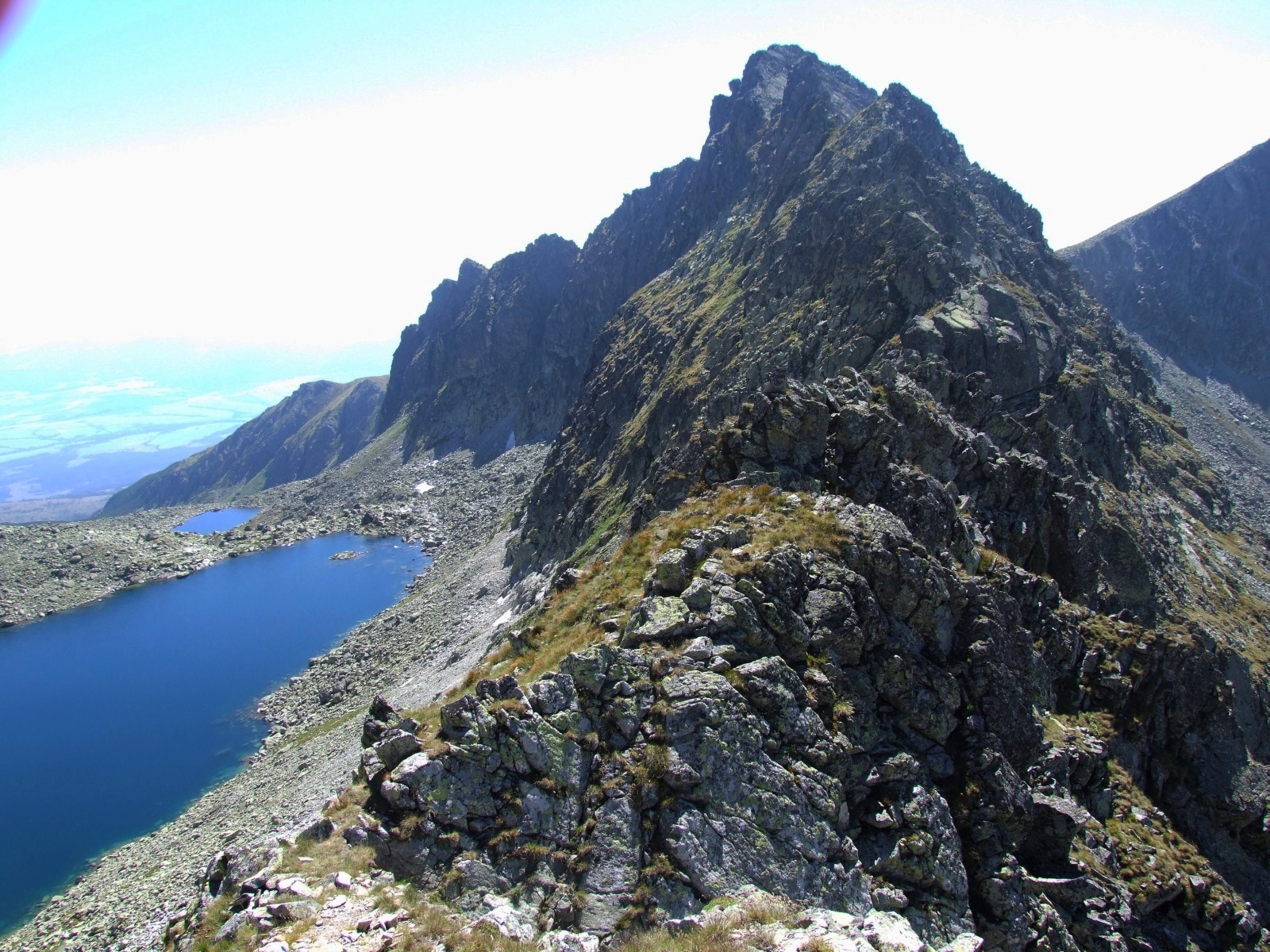 Ostra. W dole Furkotnie Stawy. Widok z przełęczy Furkotnej